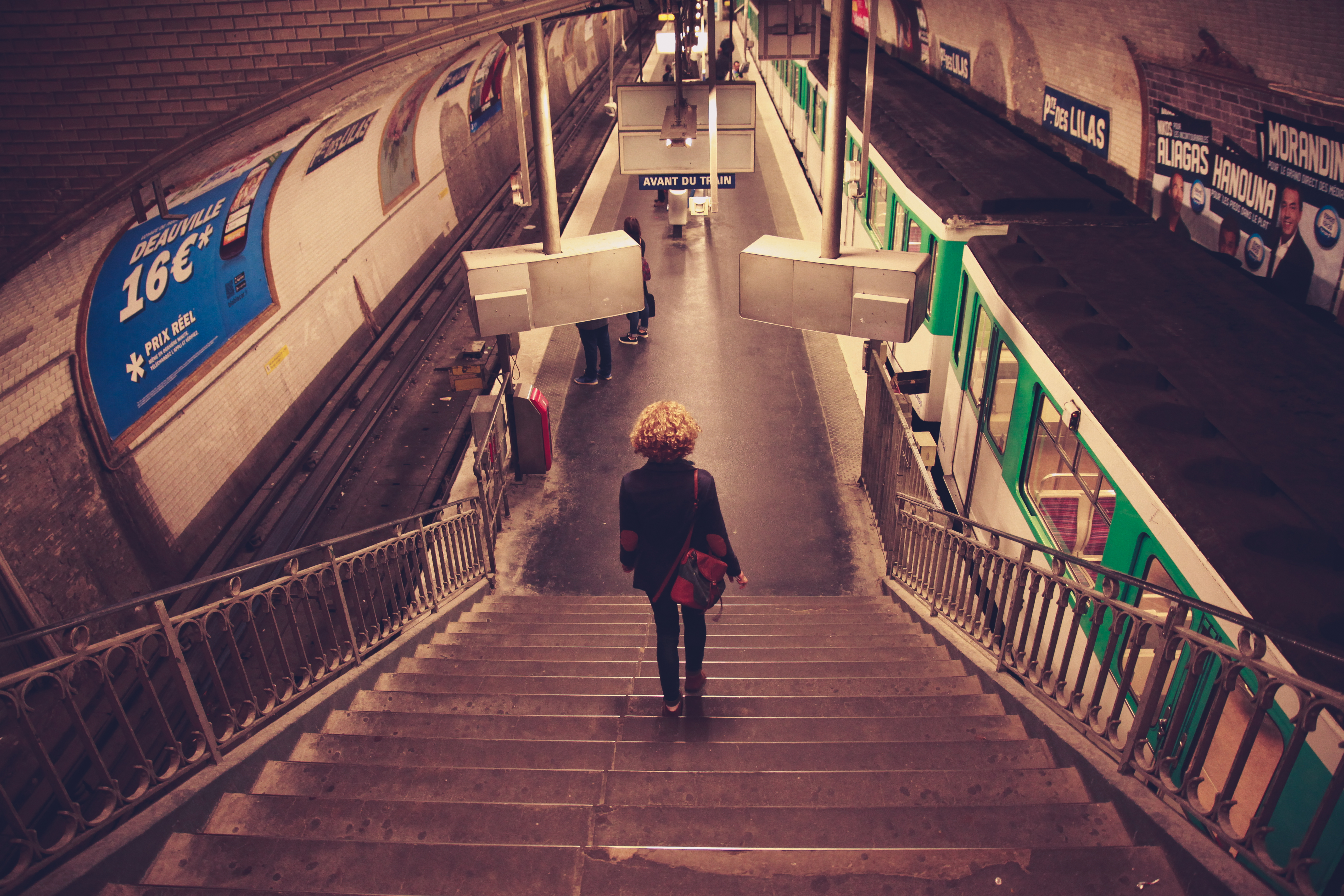 Porte des Lilas (Paris Metro)